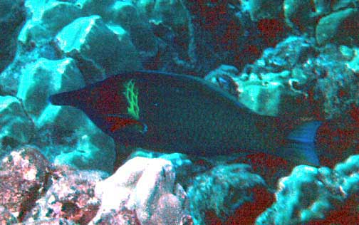 Gomphosus varius